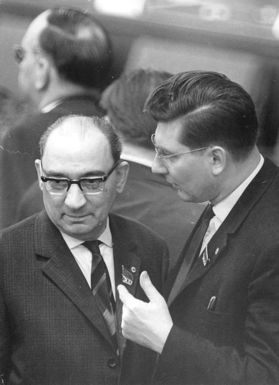 Zentralbild Gahlbeck 18.4.1967 Bgm-Qu VII. Parteitag der SED - 18.4.1967. Otto Schön, Mitglied des ZK der SED (links), im Gespräch mit Werner Lamberz, Kandidat des ZK der SED, während der Tagungspause.